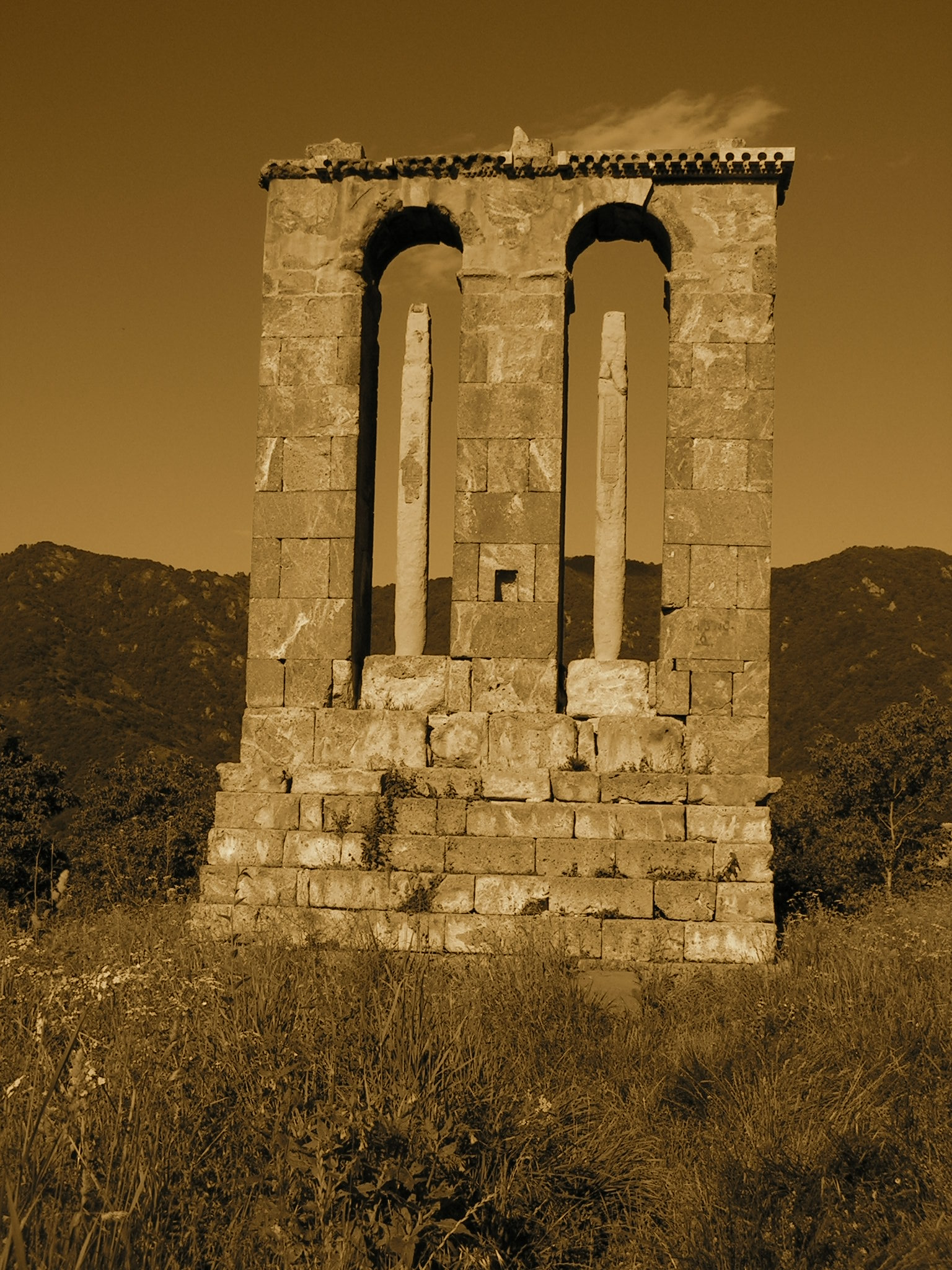 Khachgund of Odzun 112/5